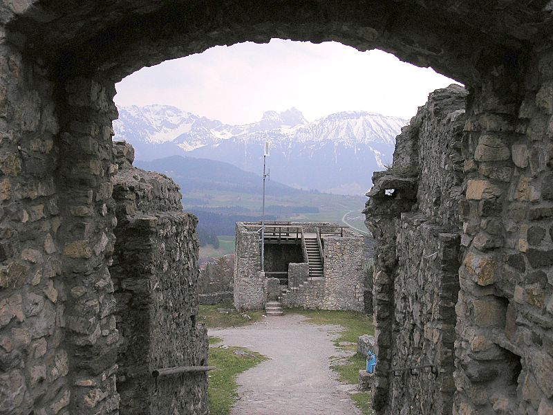 Burg Eisenberg bei Pfronten (Allgäu). Blick durch das Tor der Kernburg zum Aggenstein.